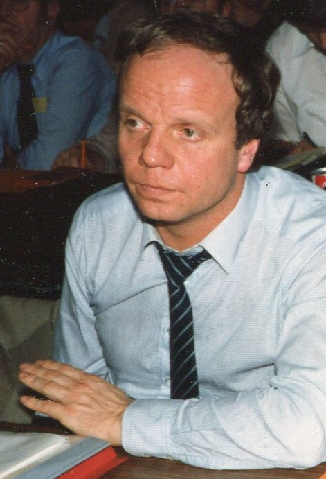 Senator Volker Lange auf dem SPD-Landesparteitag in Hamburg